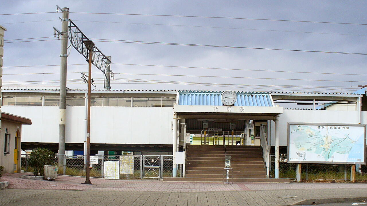 館腰駅（東口）